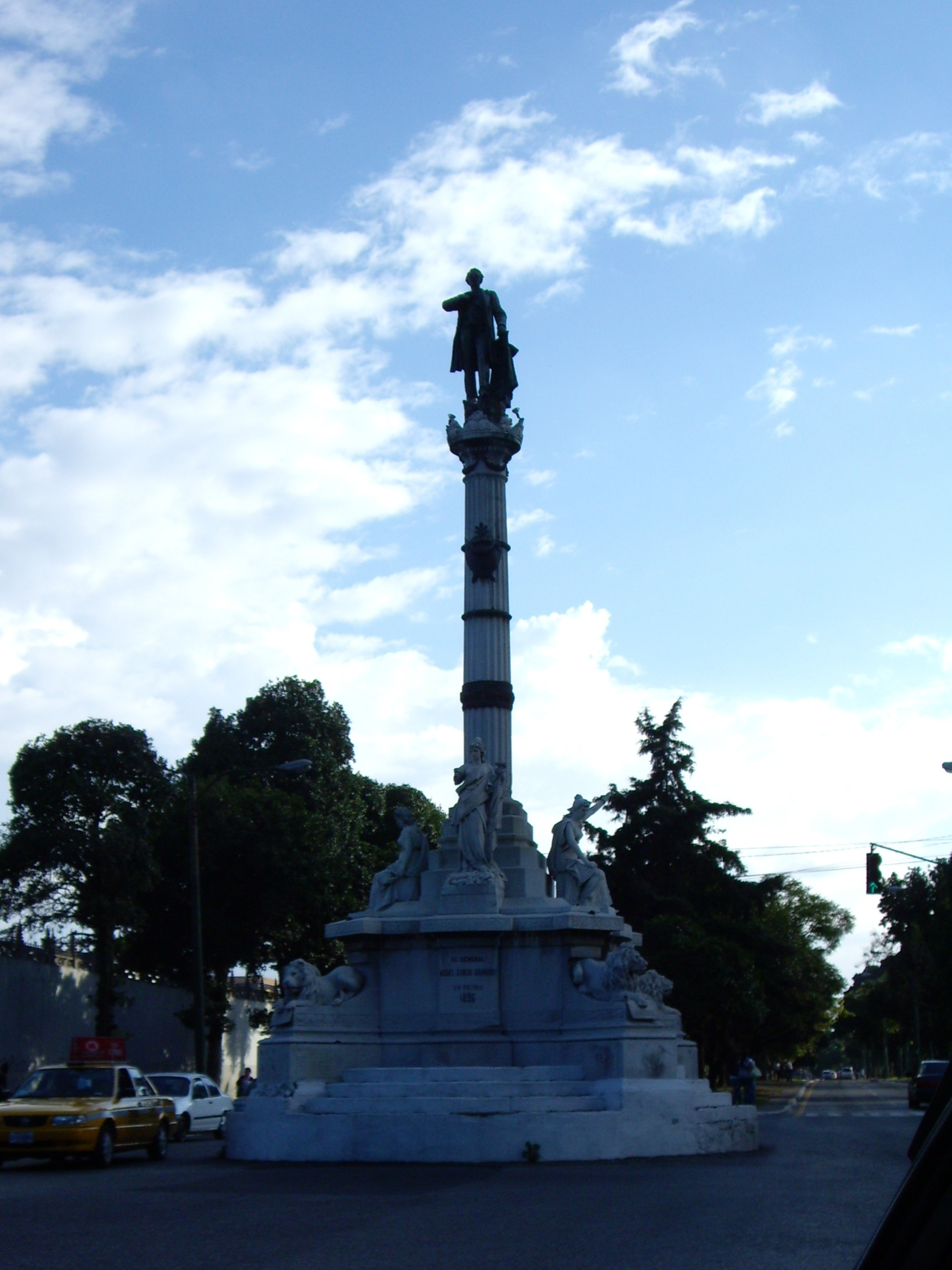 Monumento General Miguel García Granados ubicado en la Avenida Reforma Ciudad Guatemala